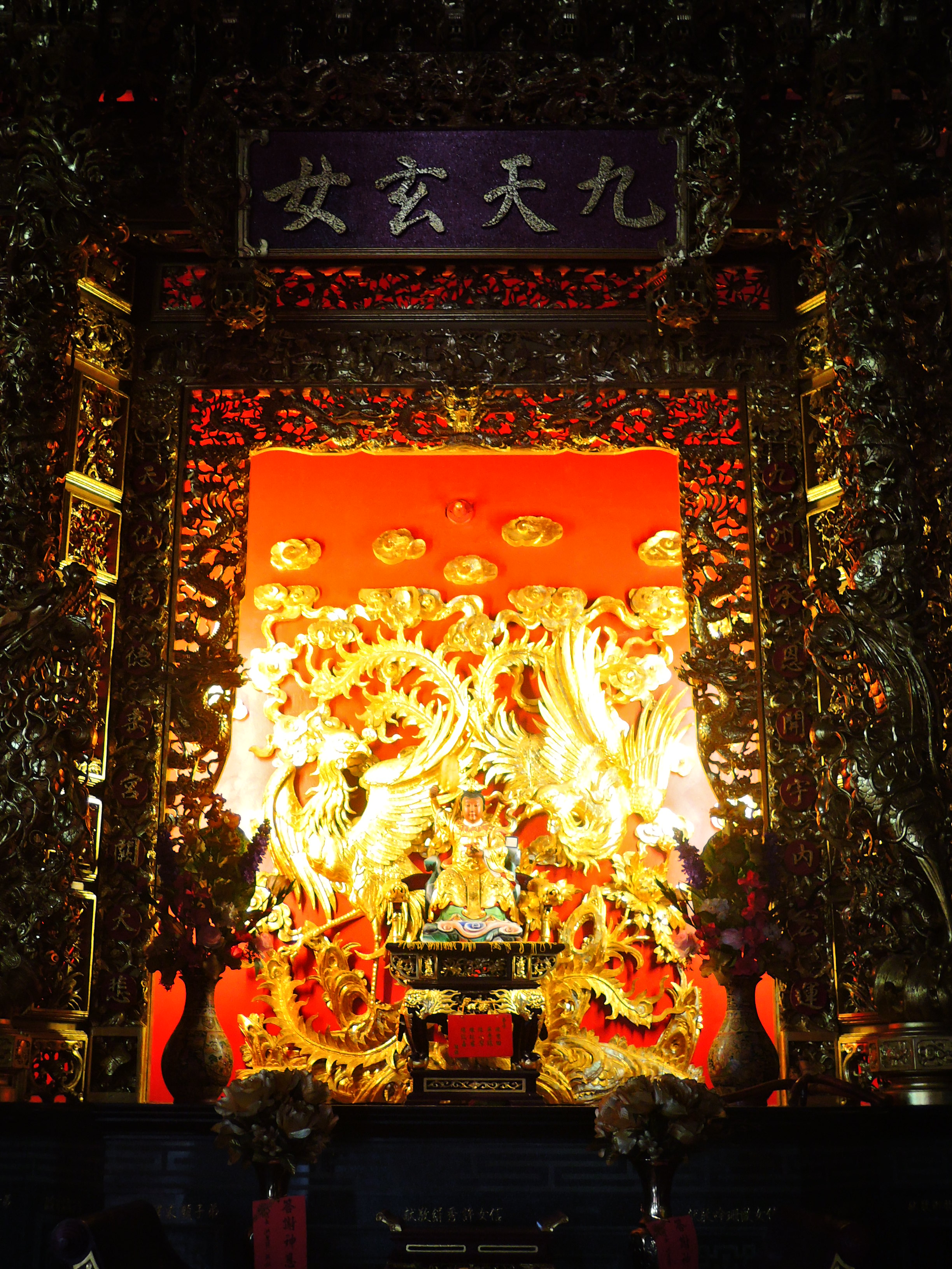 台灣澎湖縣湖西鄉廟宇，位於白坑村，主祀玉皇大帝。